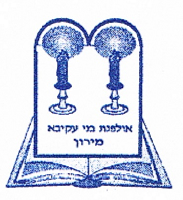 לוגו האולפנה